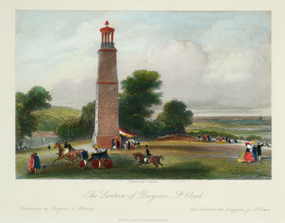 hauts de seine archives la disparition du palais Trabucchi frères